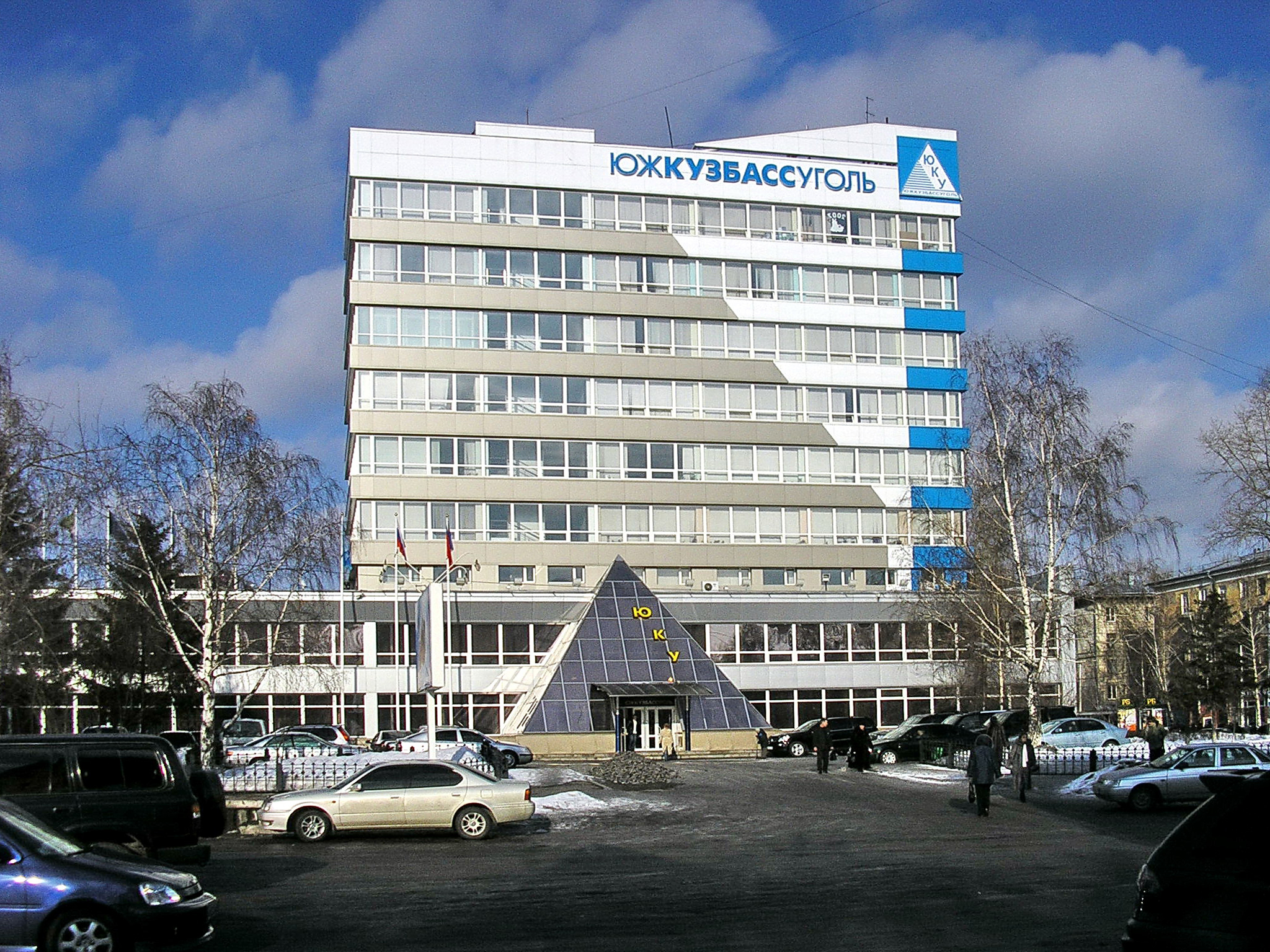 Южкузбассуголь